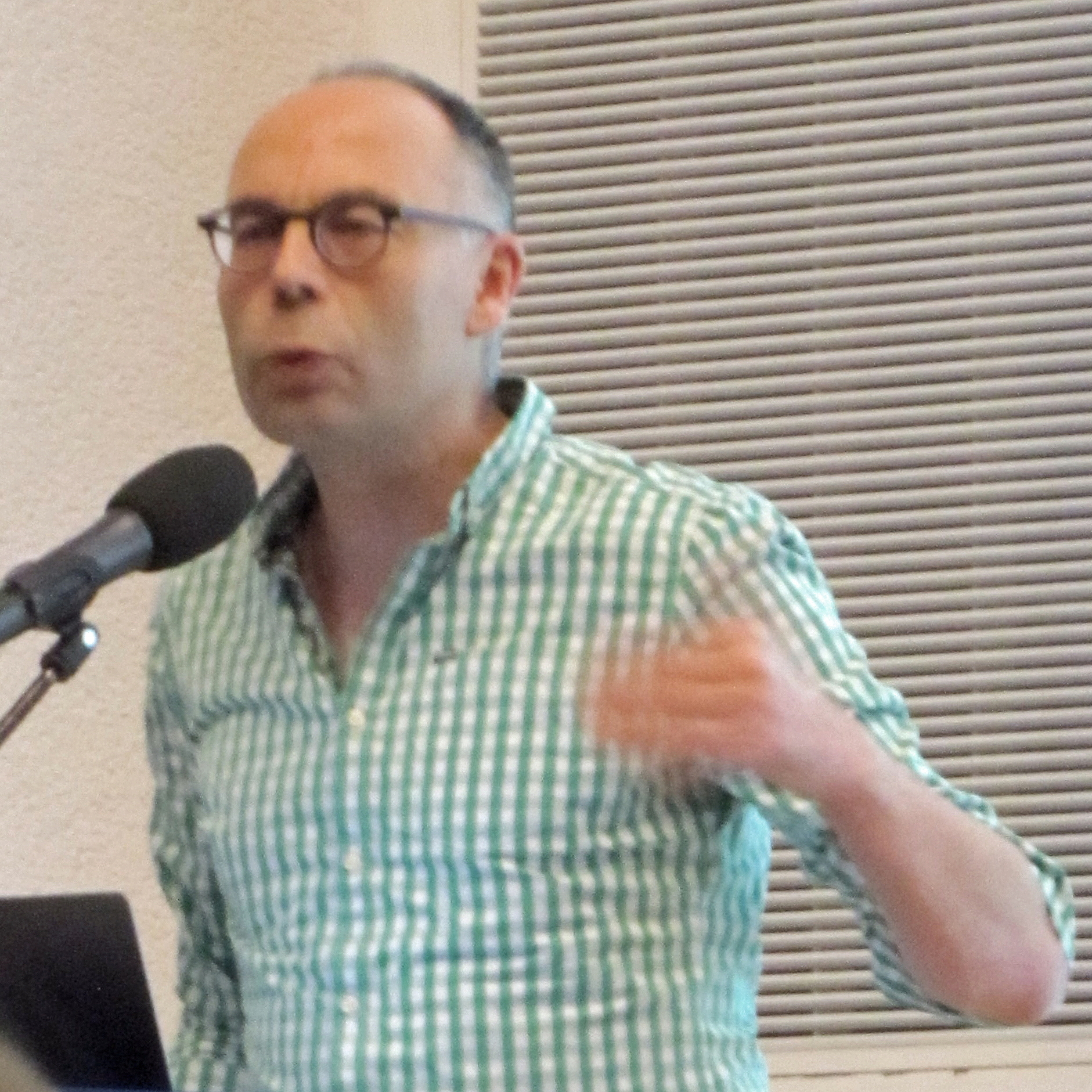 Stephan Lessenich, bei den 47. Römerberggesprächen, Thema:„30 Jahre nach dem Mauerfall – mehr Aufbruch wagen“, im November 2019 im Chagall-Saal der Städtischen Bühnen in Frankfurt am Main.